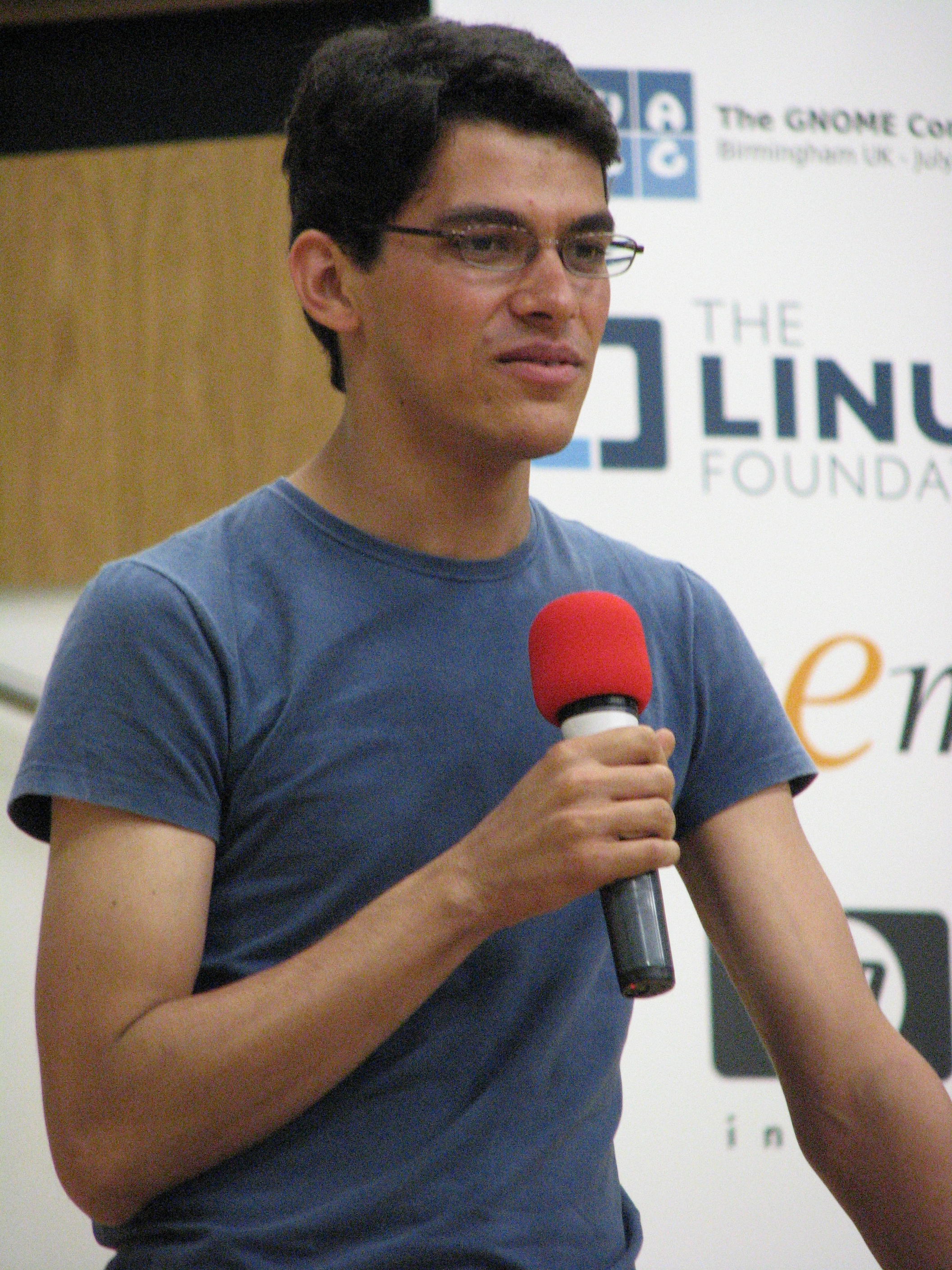 Federico Mena